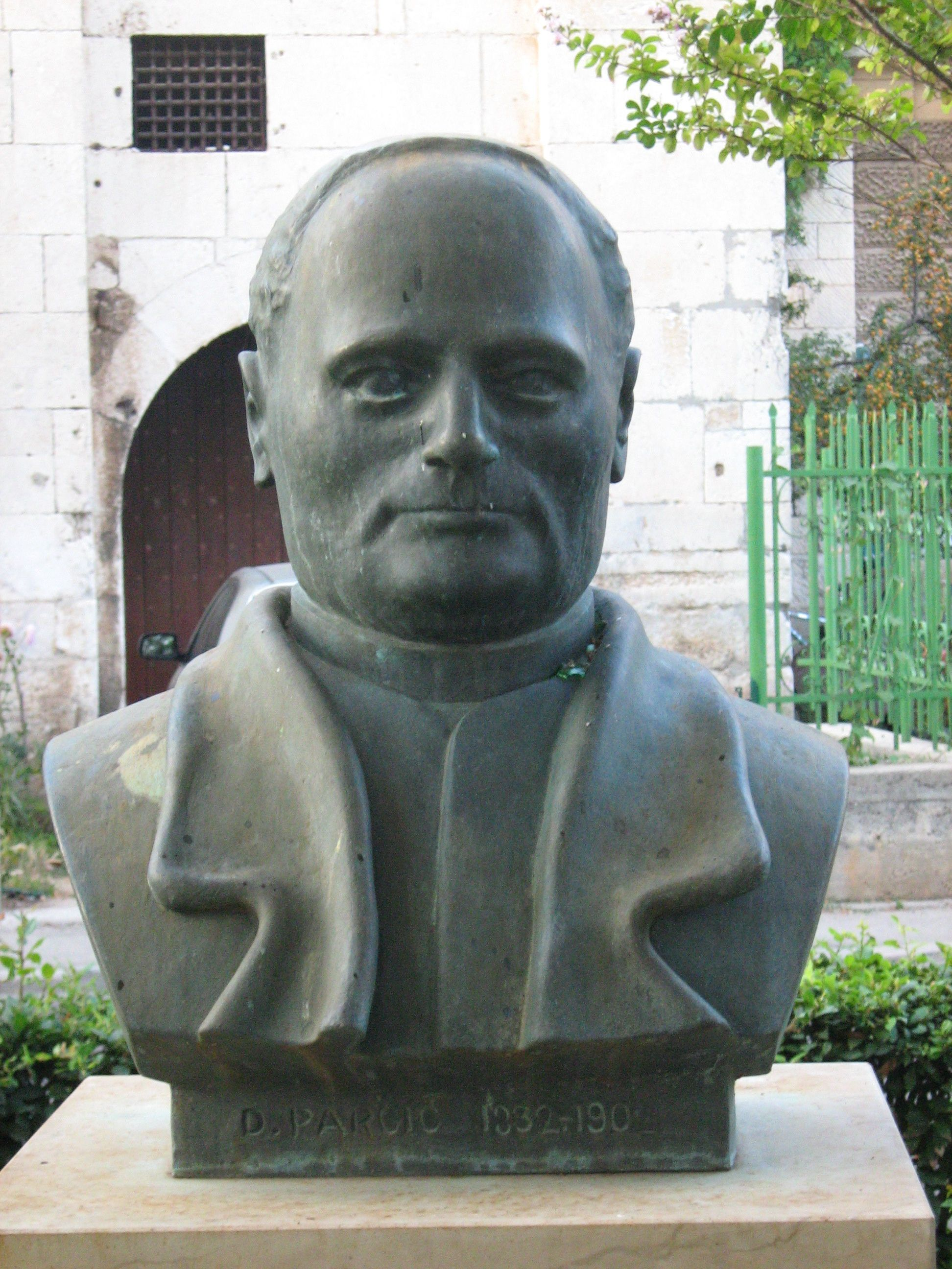 Dragutin Parčić